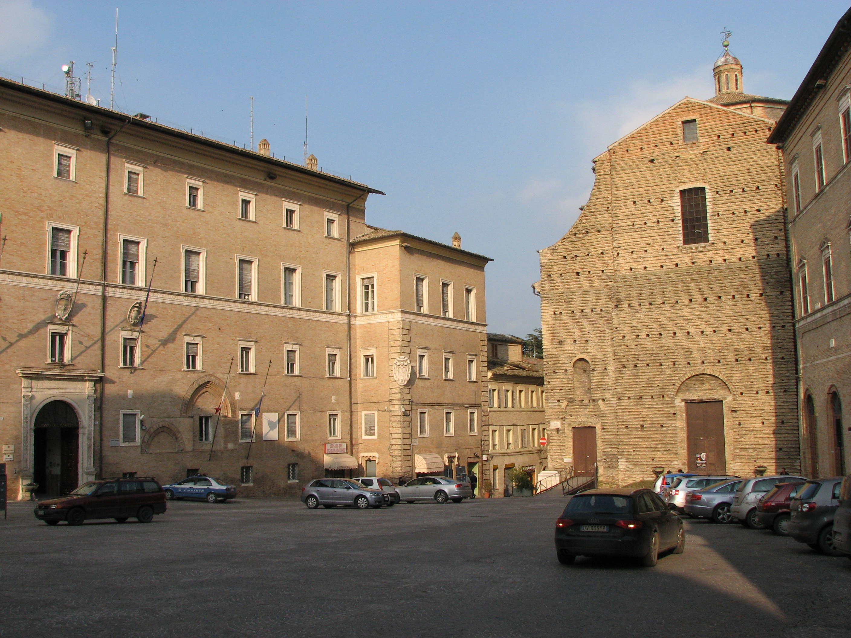 Piazza della Libertà in Macerata, Italy